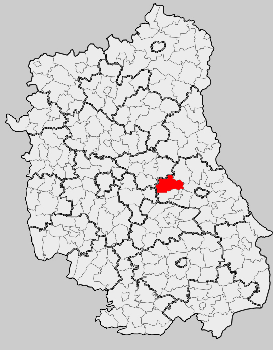 Map of gmina Siedliszcze, Chełm county, Lublin voivodship Mapa gminy Siedliszcze, powiat chełmski, województwo lubelskie